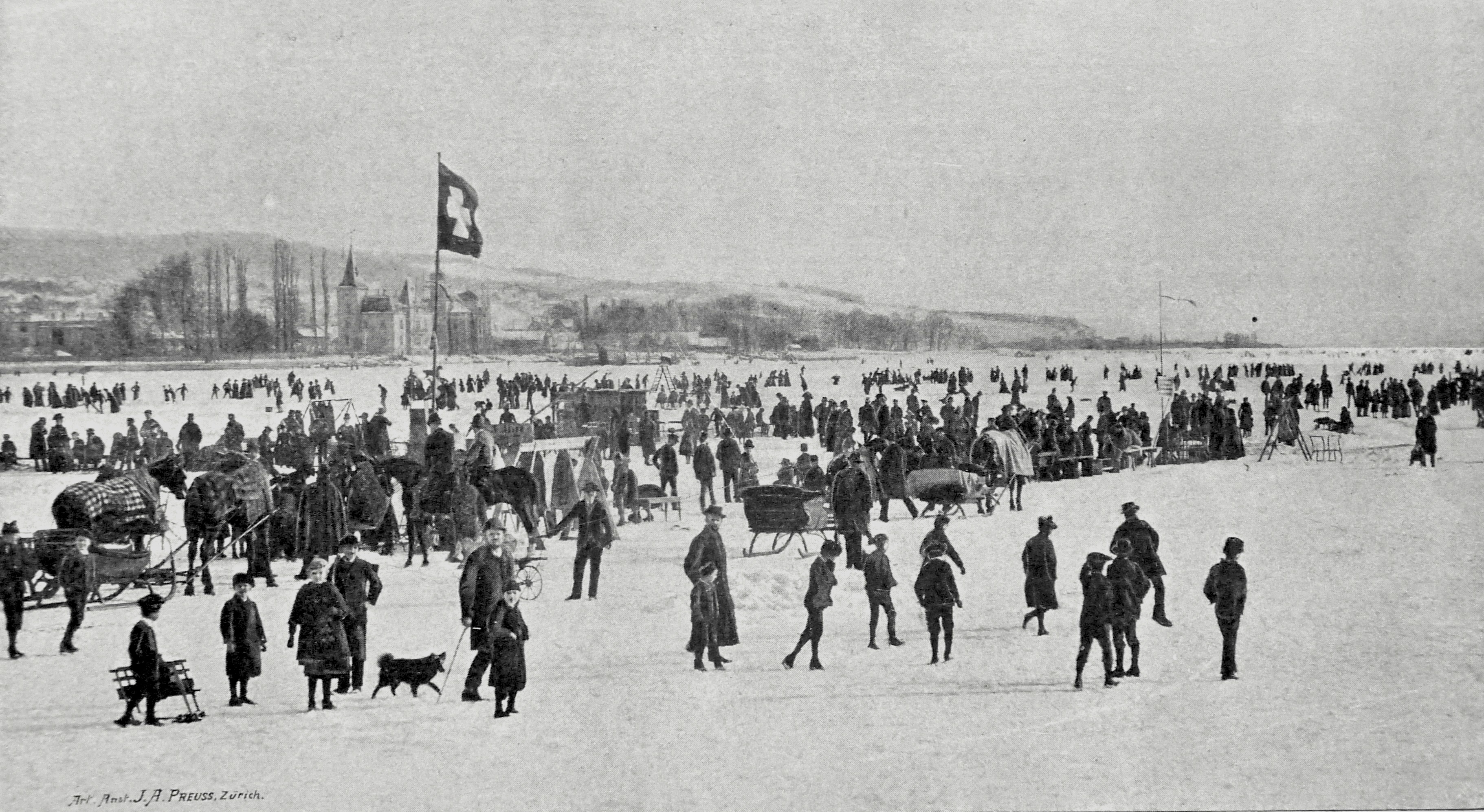 gefrorener Zürichsee 1891